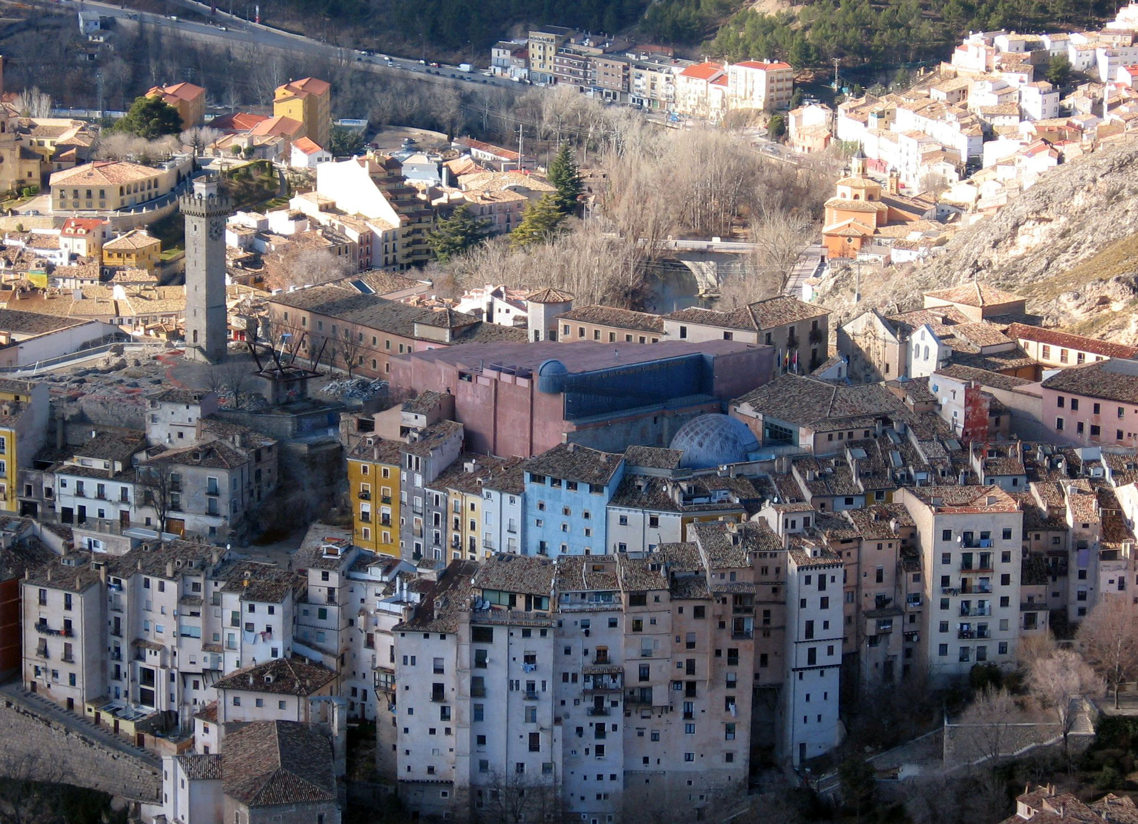 CUENCA - Los Rascacielos, Museo de Ciencias, Torremangana y puente San Antón desde el cerro Socorro